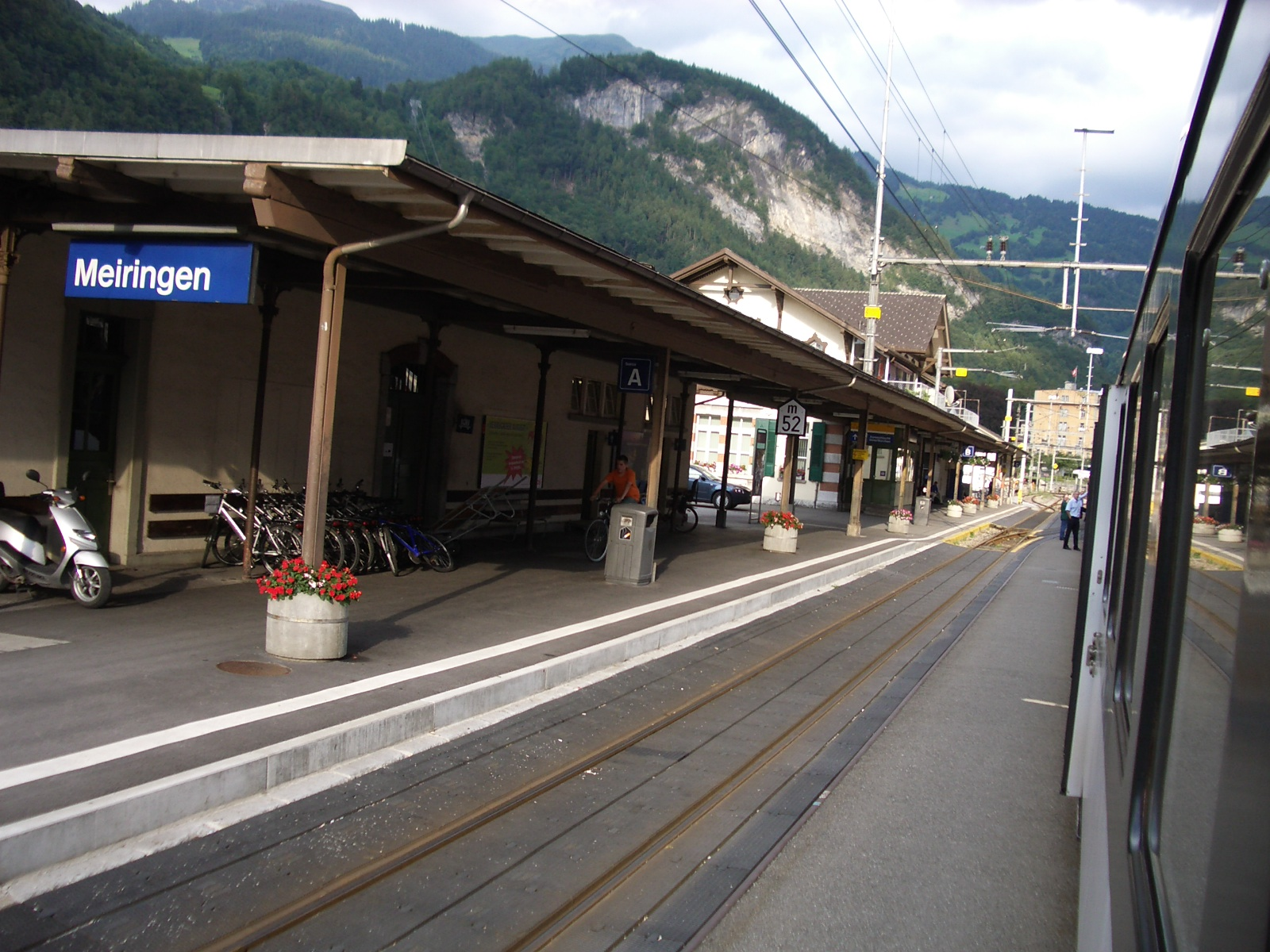 Meiringen BE, Switzerland self-made, August 2006